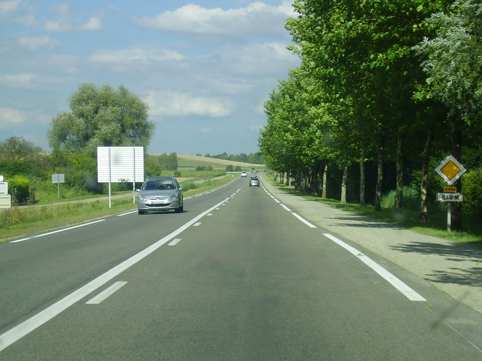 Sortie de Riom, Puy-de-Dôme, Auvergne, France, par la RD 446, contournement ouest et nord